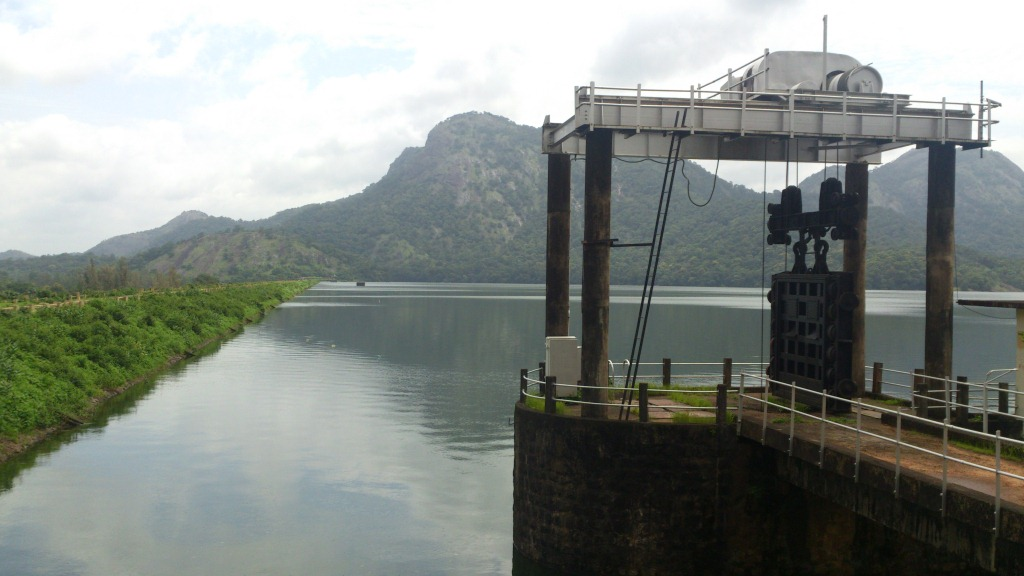 പോത്തുണ്ടി ഡാം നെല്ലിയാമ്പതി